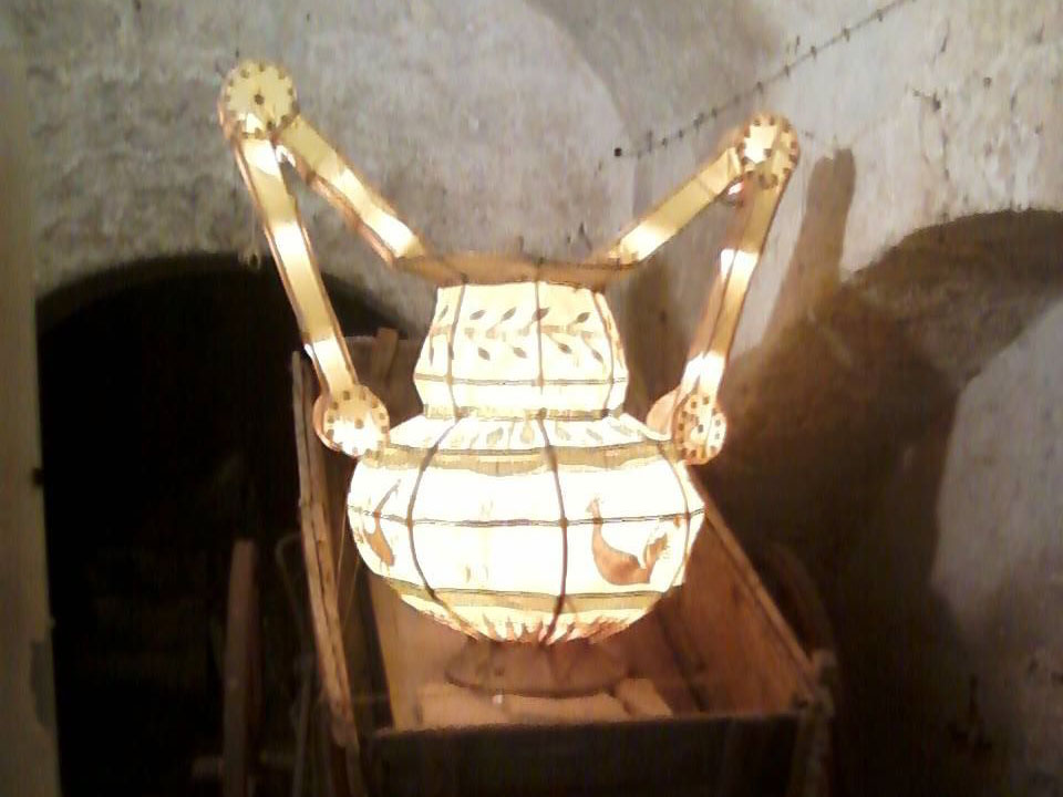 Lampione a forma di trozzella durante la "festa dei lampioni" a Calimera